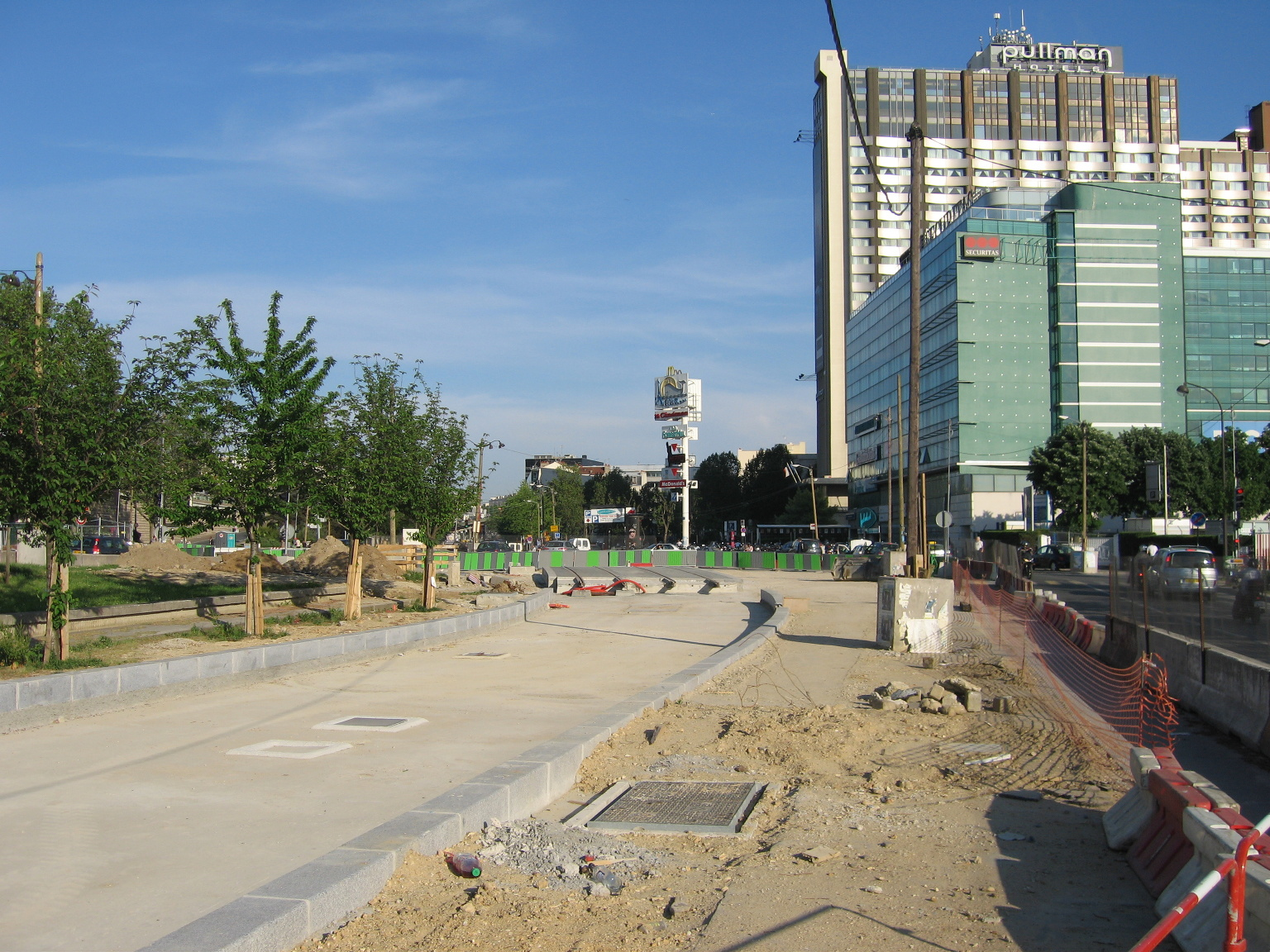 Travaux de la ligne T2 à Paris, Porte de Sèvres. Vue depuis le bas de la rue Henry Farman vers porte de Sèvres.